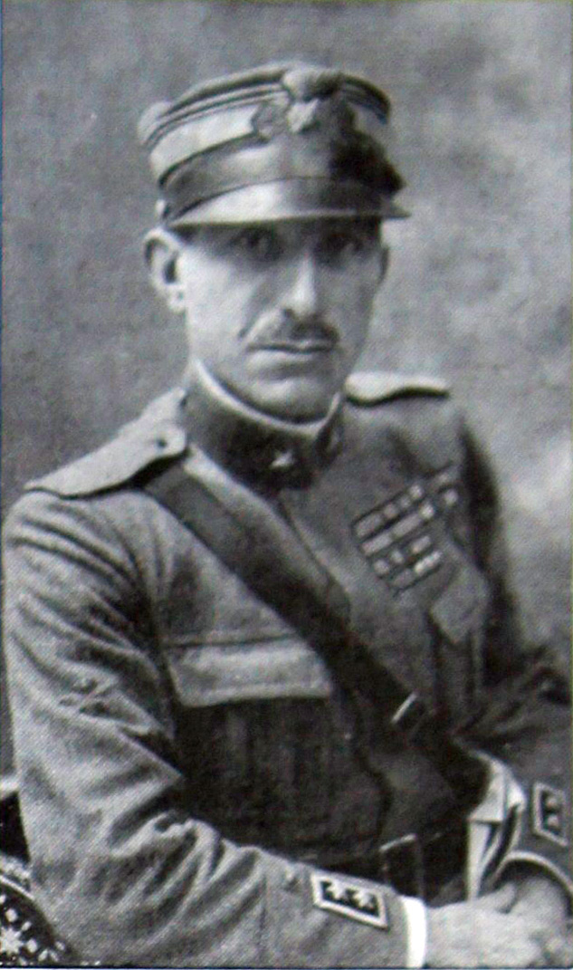 L'as Pier Ruggero Piccio, photographie parue dans l'Illustration.